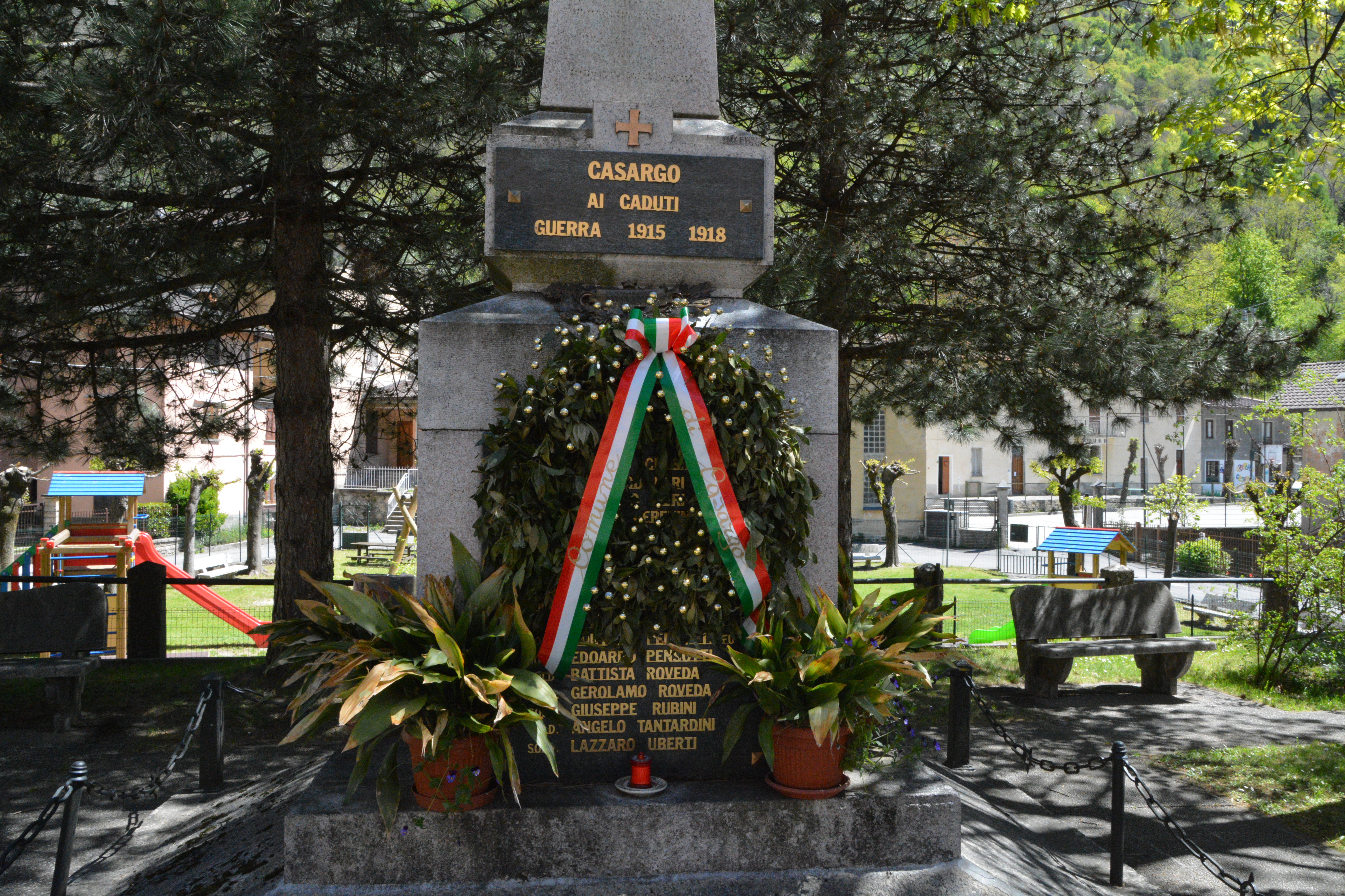 Monumento ai Caduti di via Italia a Casargo. This is a photo of a monument which is part of cultural heritage of Italy.